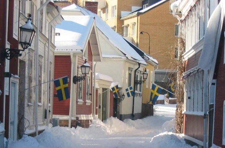 Smedjegatan, Gamla Gefle, Gävle. (Smedjegatan, Old town, Gävle, Sweden.) Carmen Hevia